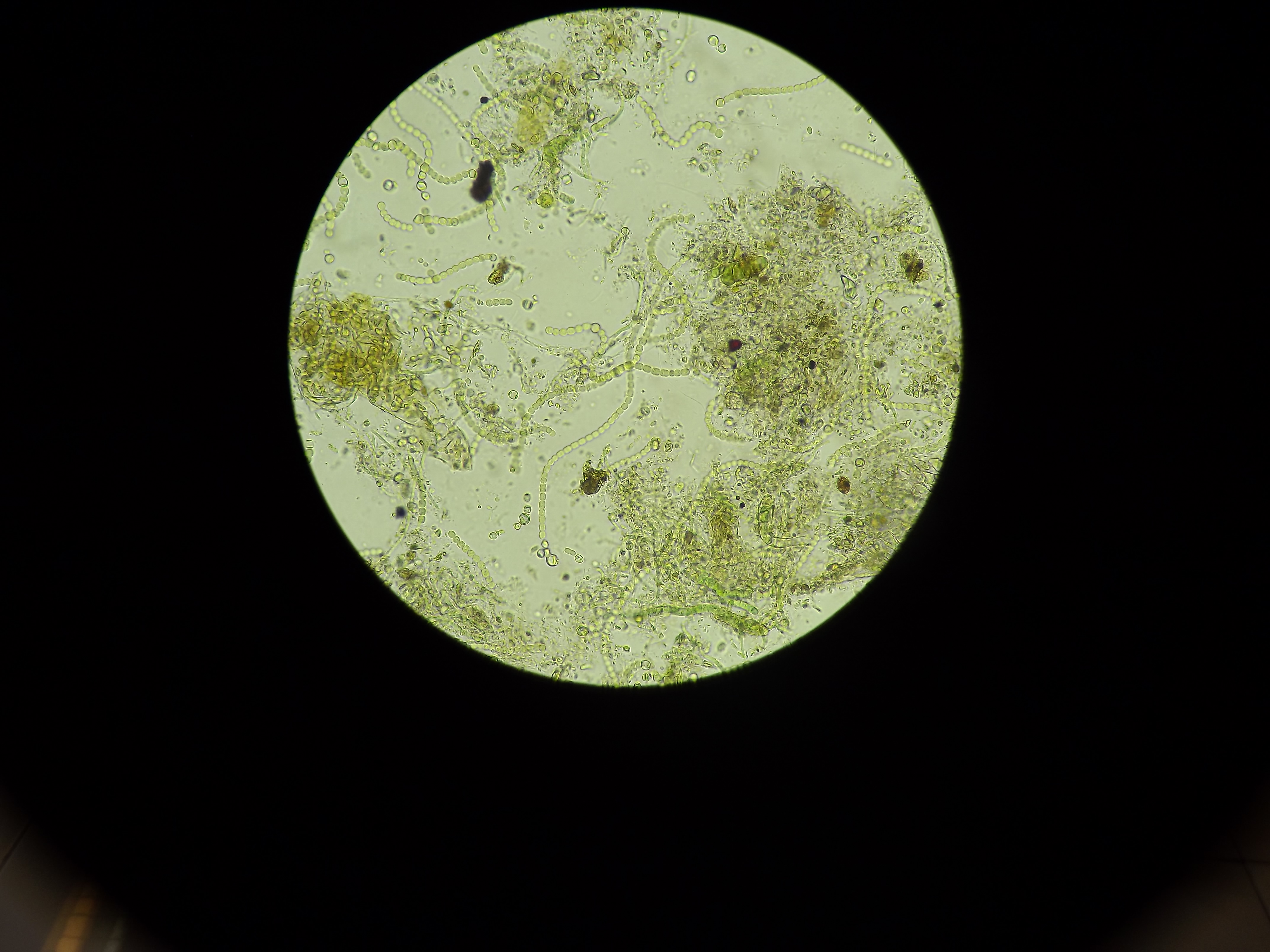 Fotogragía de un preparado de Microorganismos observado al M.O.